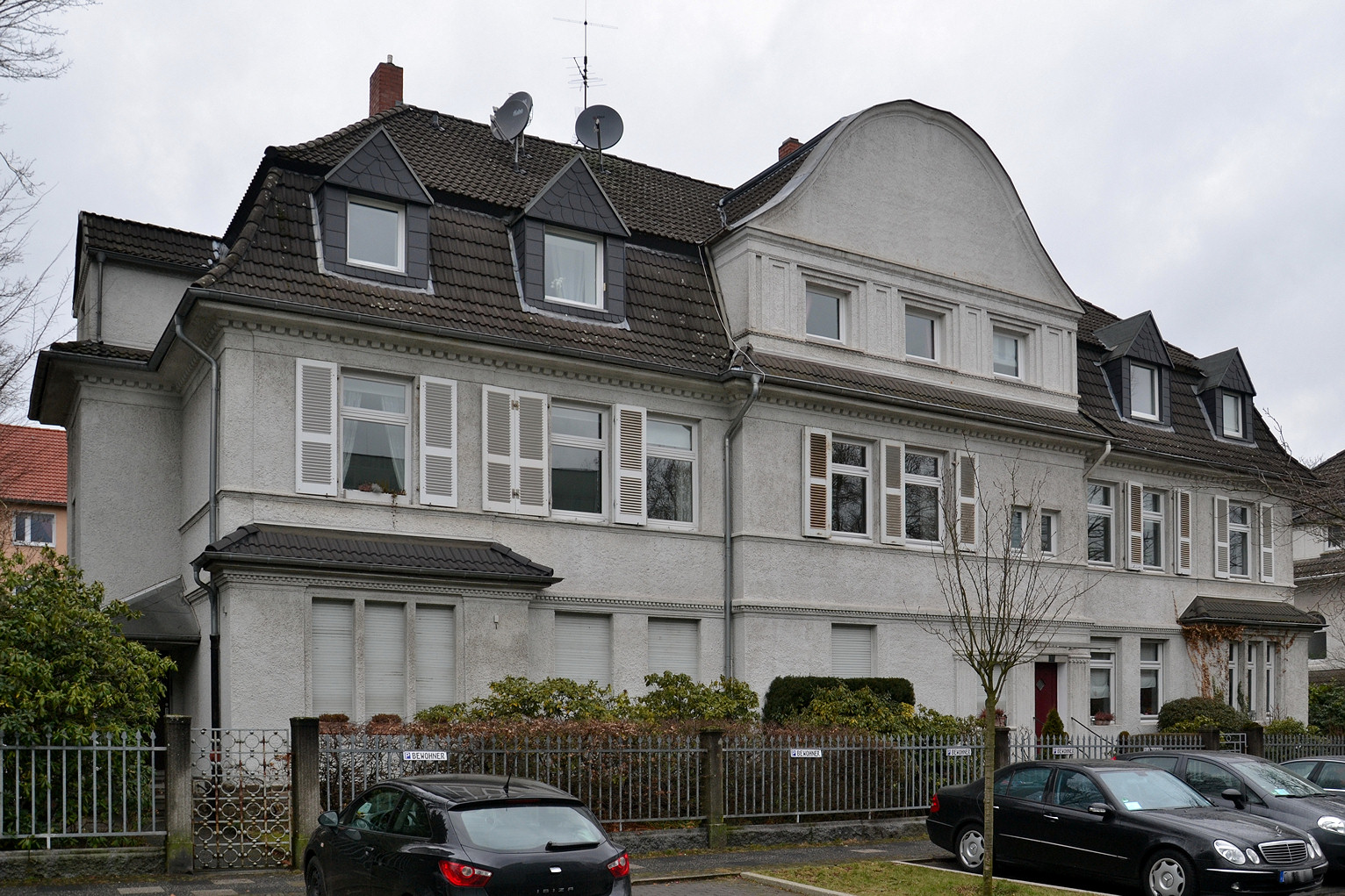 Kruppsche Beamtenhäuser in Essen